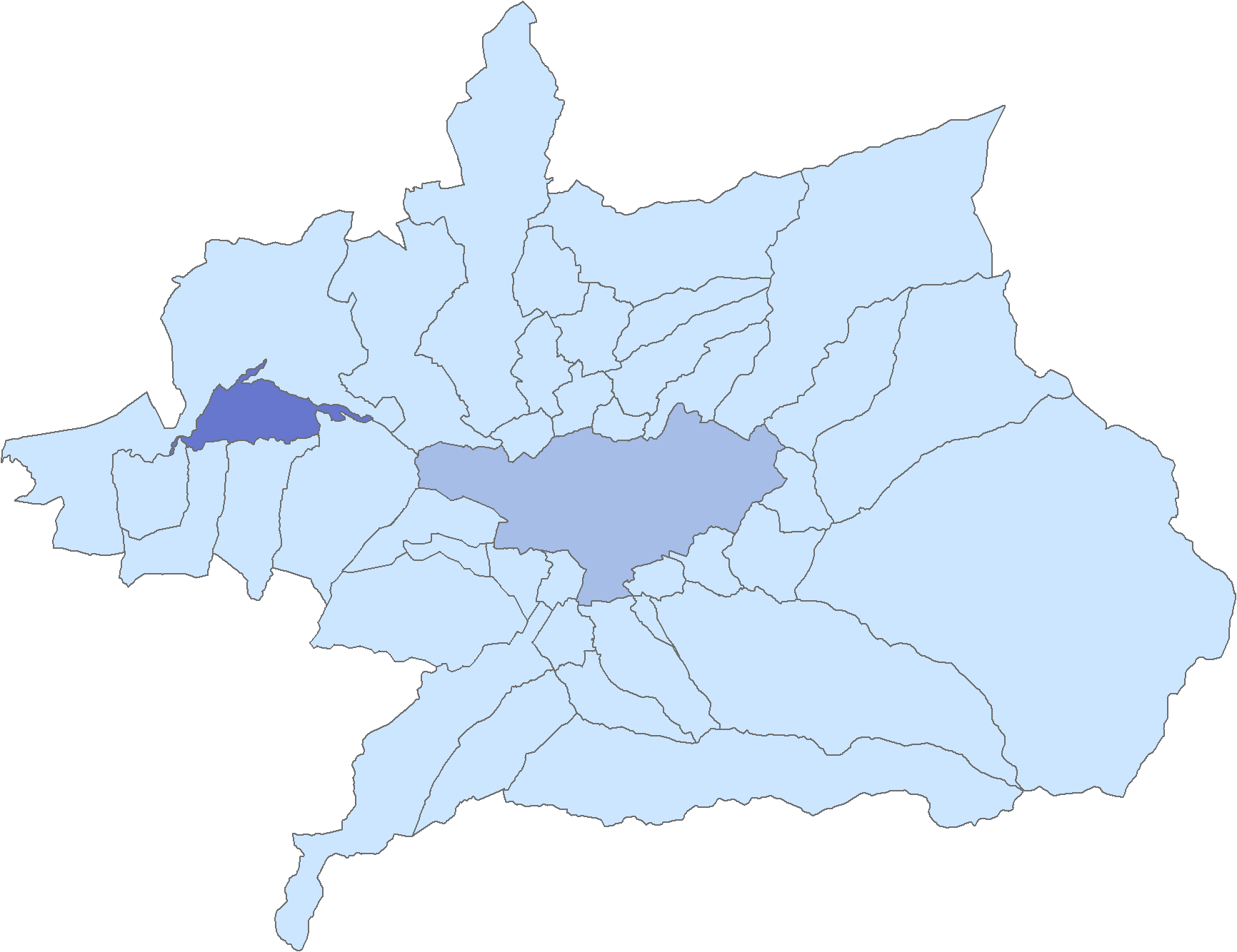 Situación del municipio de Fuente Vaqueros respecto a la comarca de la Vega de Granada, en España.